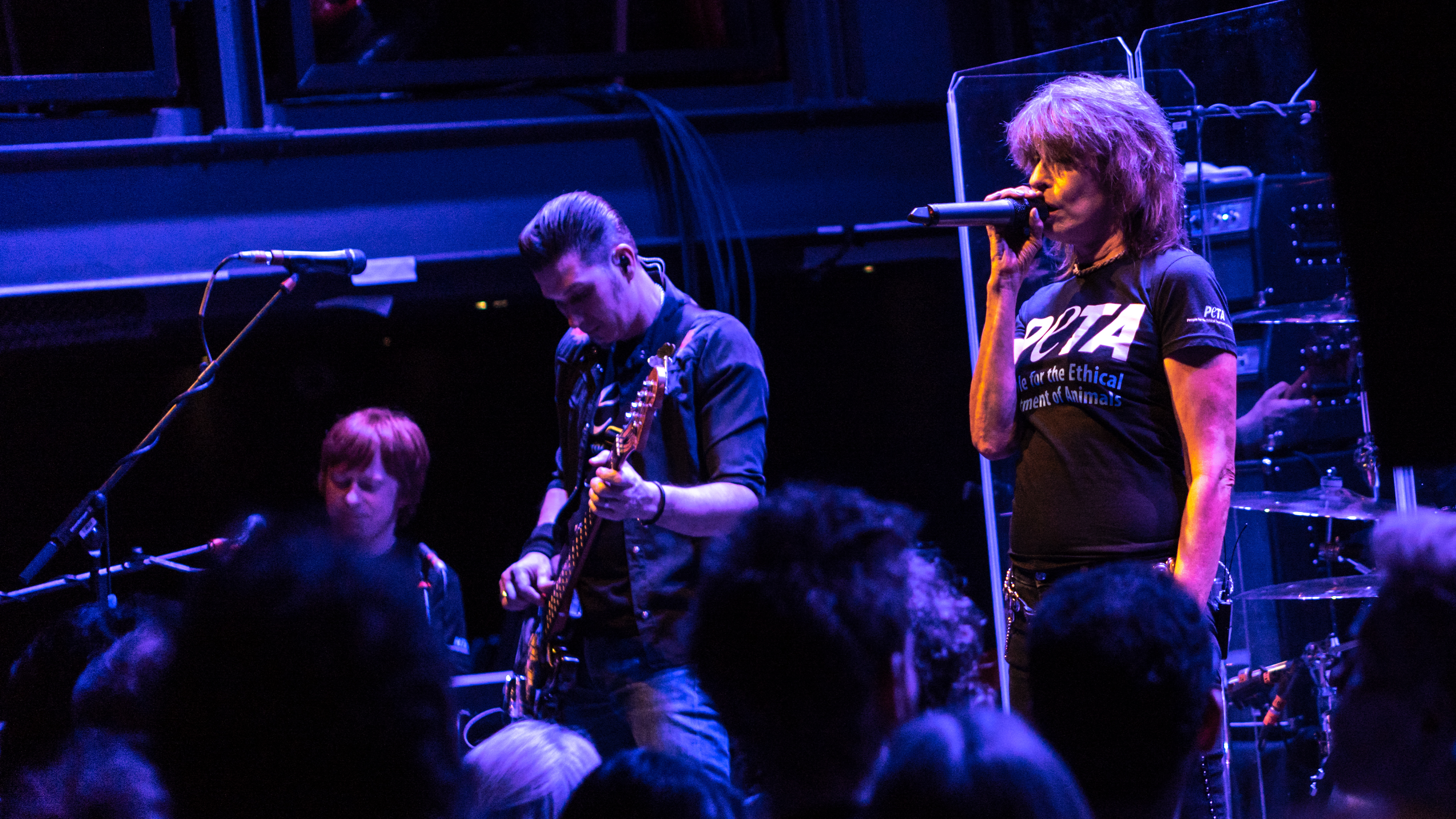 PretendersSubter260418-9